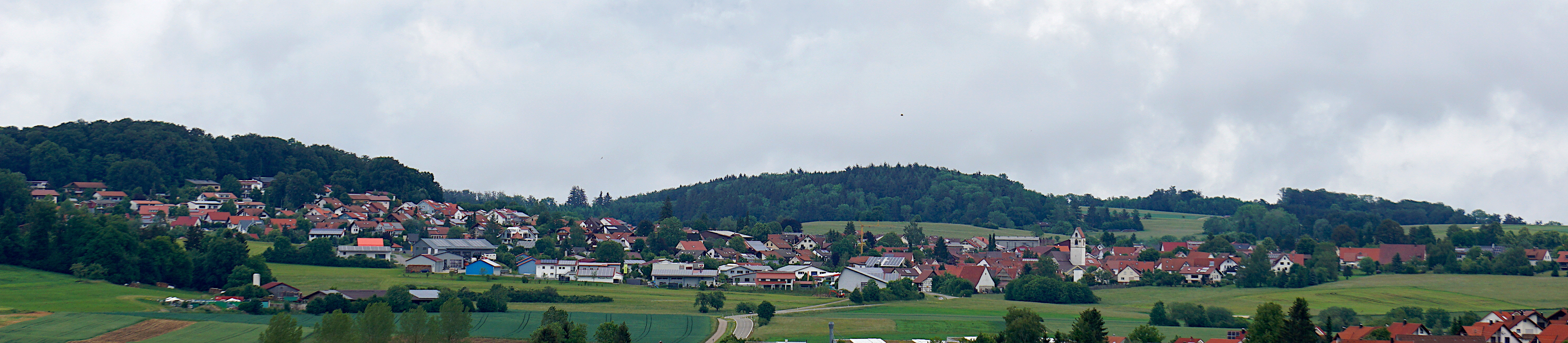 Upfingen vom Westen aus gesehen.